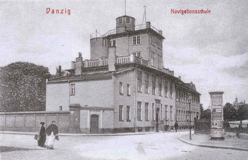 Gdańsk, nieistniejąca Królewska Szkoła Nawigacyjna przy ul. Karpiej 26.